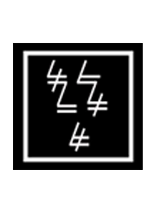 الشعار الرسمي لمدرسة الزمقتال مصارعة الصرع